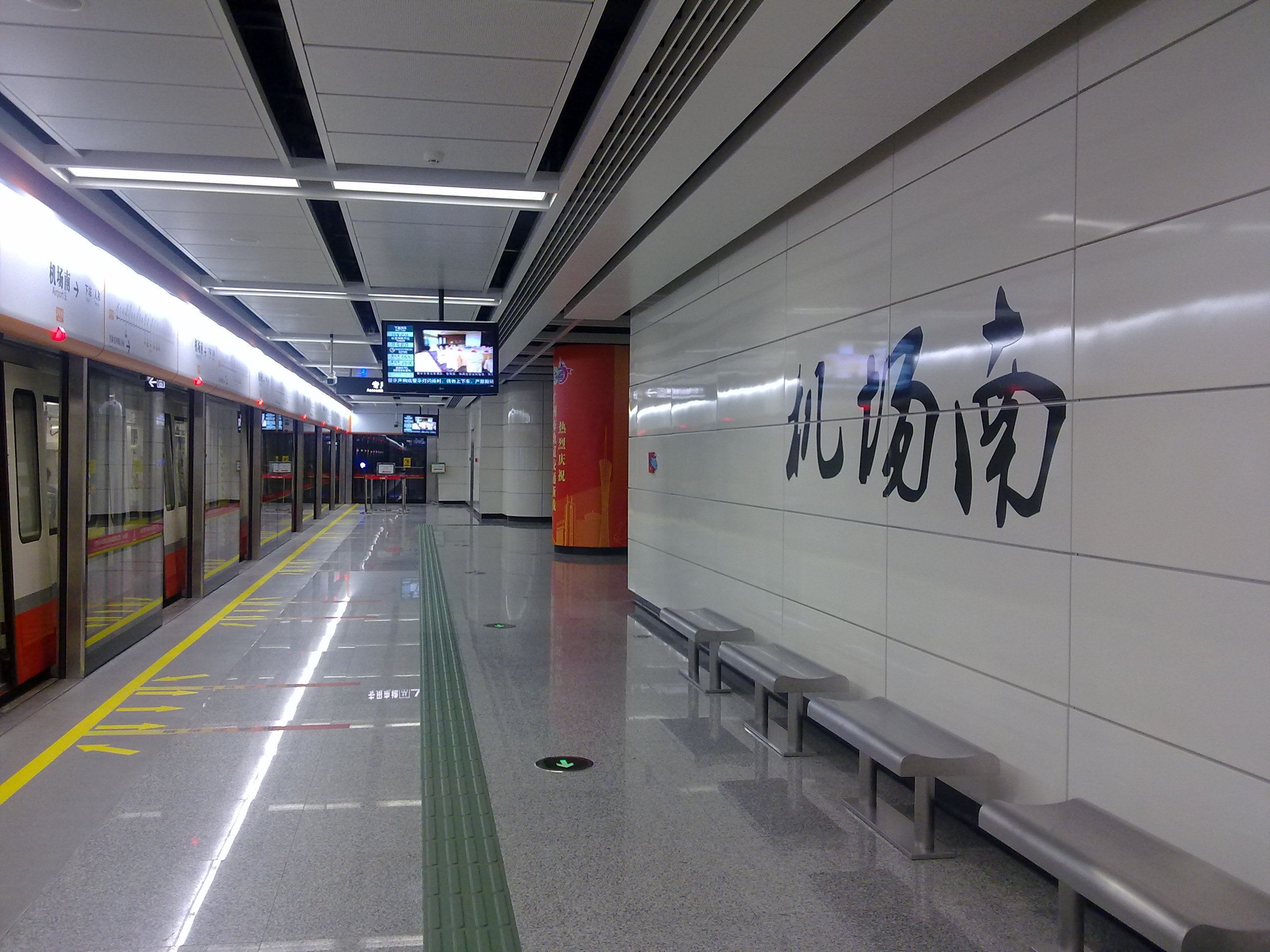 廣州地鐵機場南站站台